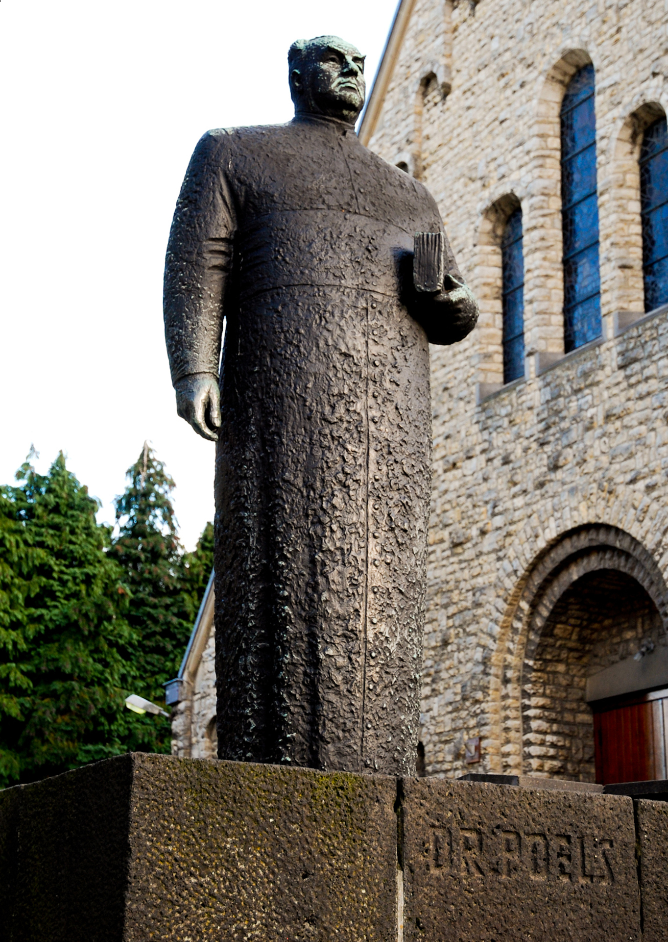 Bronzen beeld van Dr. H.A. Poels van de Nederlandse kunstenaar Wim van Hoorn. Het beeld werd in 1954 geplaatst op het Emmaplein te Heerlen. Later is het verplaatst naar het Rector Poelsplein bij de St. Martinuskerk te Heerlen-Welten.